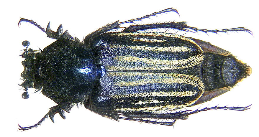 Eulasia vittata vittata (Fabricius, 1775). Familie: Glaphyridae Groesse: 16-22 mm Fundort: Türkei, Prov. Adana, Osmaniye, Akiar leg. A.Skale, 2002; det.Rößner Photo: U.Schmidt, 2006